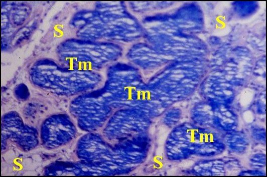 Glandes salivaires muqueuses colorées par le bleu alcian dans un choristome de la caisse du tympan